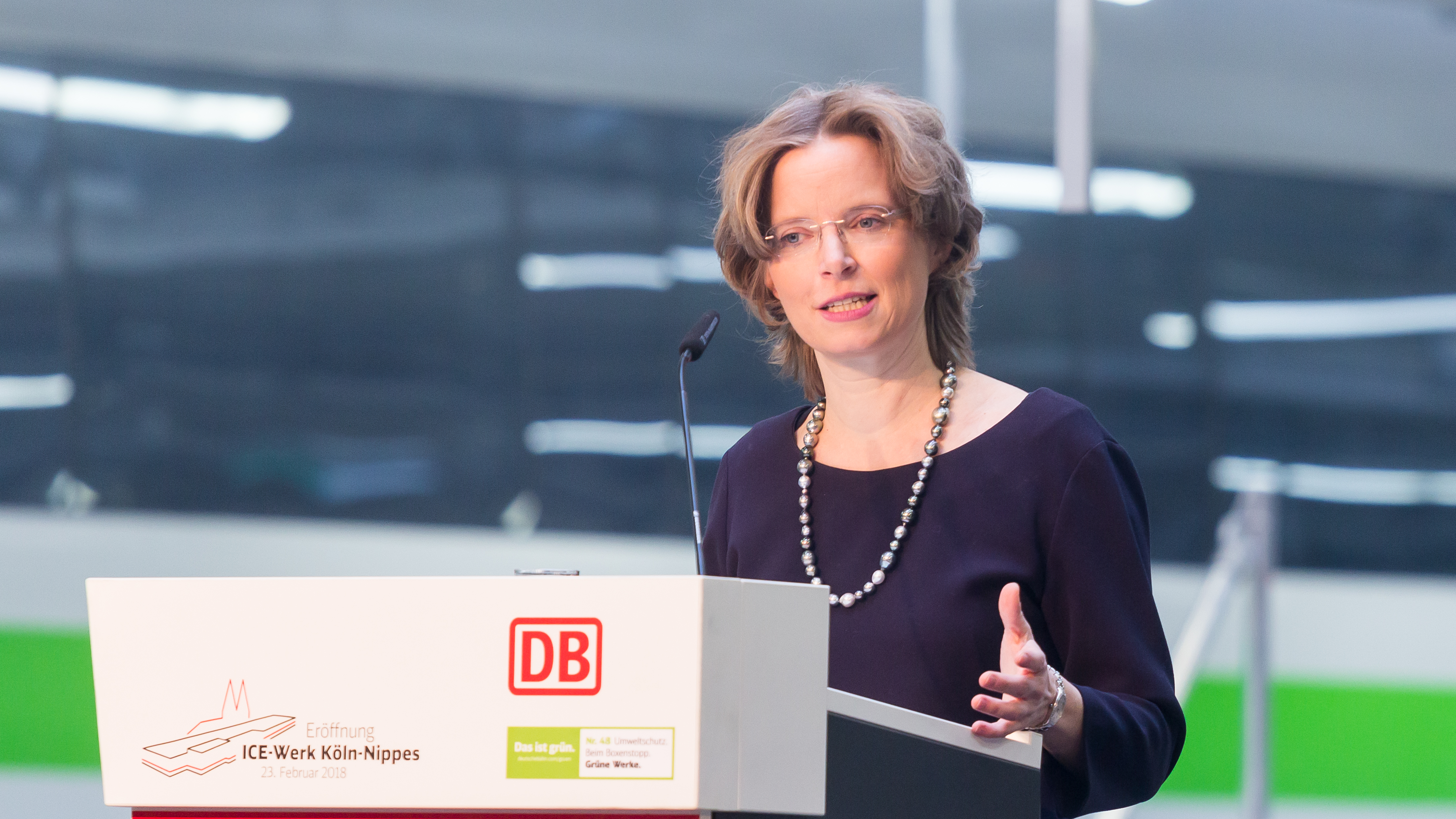 Eröffnung des ICE-Instandhaltungswerkes der Deutschen Bahn in Köln-Nippes Foto: Ansprache durch Birgit Bohle, Vorsitzende des Vorstands der DB Fernverkehr AG.